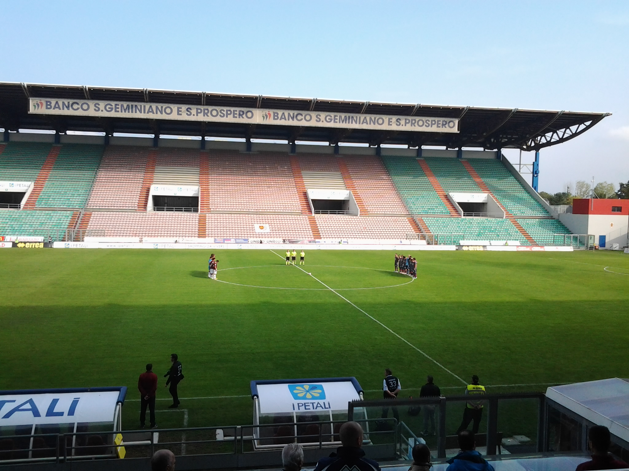 Autore: RegSimo Descrizione: Minuto di silenzio prima della partita Reggiana-Bologna (amichevole), ottobre 2012 Licenza d'uso: Pubblico dominio, rinuncio a tutti i diritti, sono l'autore Fonte: RegSimo autore di questa fotografia